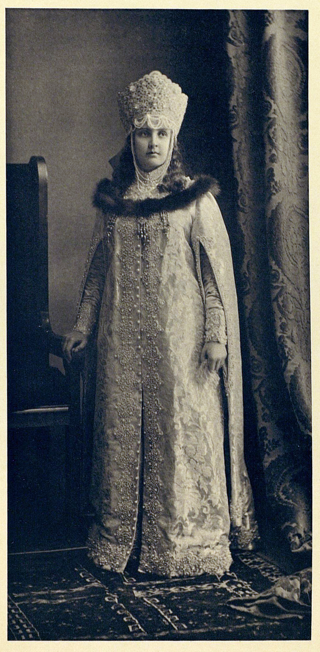 Фрейлин свиты Е. И. В. Государыни Императрицы Александры Феодоровны Александра Александровна Оленина, в наряде боярышни конца XVII века.